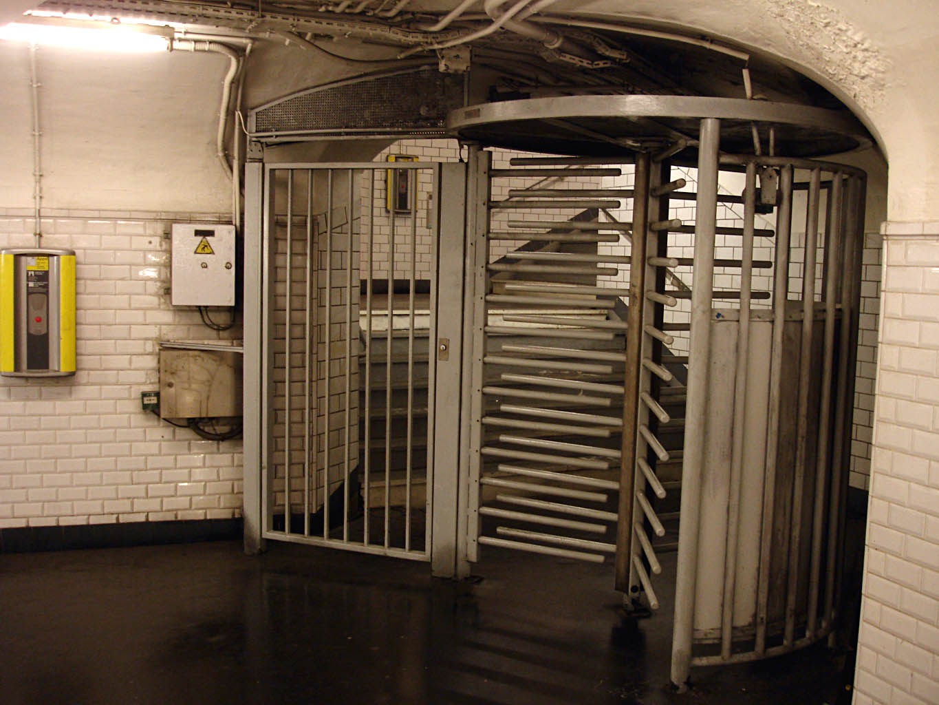 Métro de Paris (France) - Tourniquet de sortie de la station Arts et Métiers